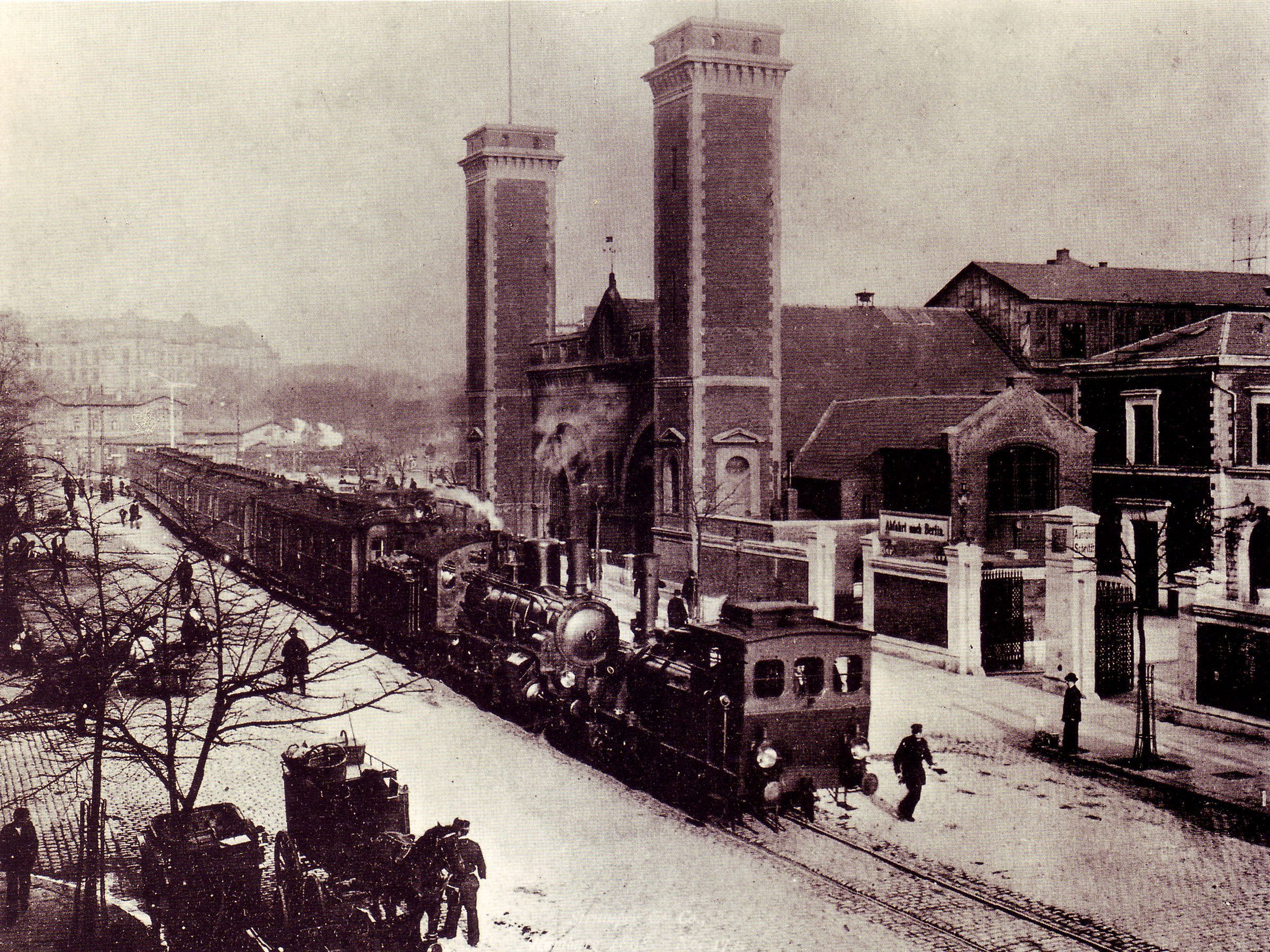 ehemaliger Berliner Bahnhof in Hamburg-Altstadt